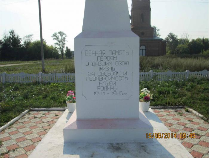 Обелиск Бурминка